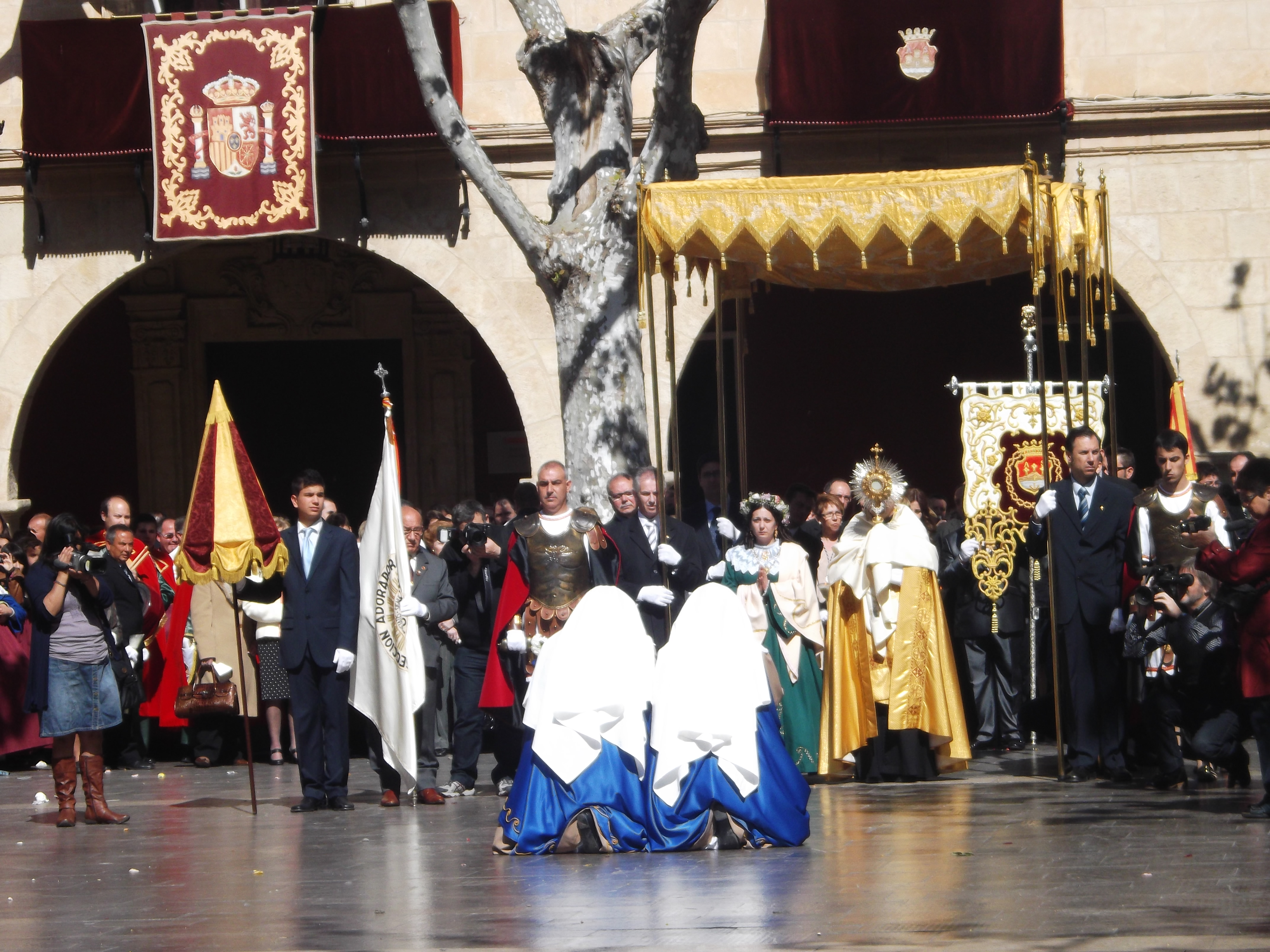 Cortesías de las Marías en la "Mañanica de Pascua" durante la Semana Santa de Aspe.